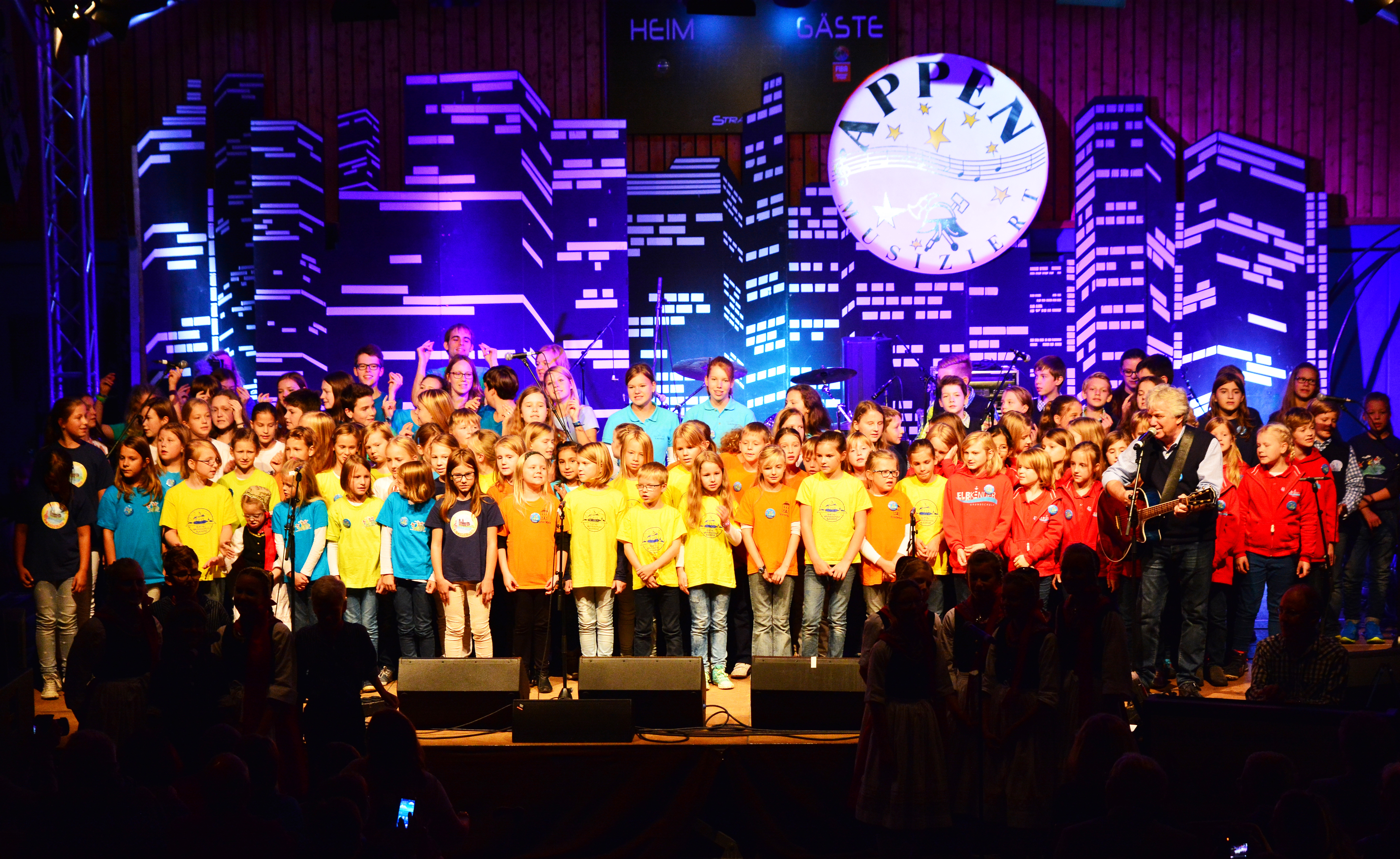 Der Elbkinderlandchor bei Appen musiziert 2015